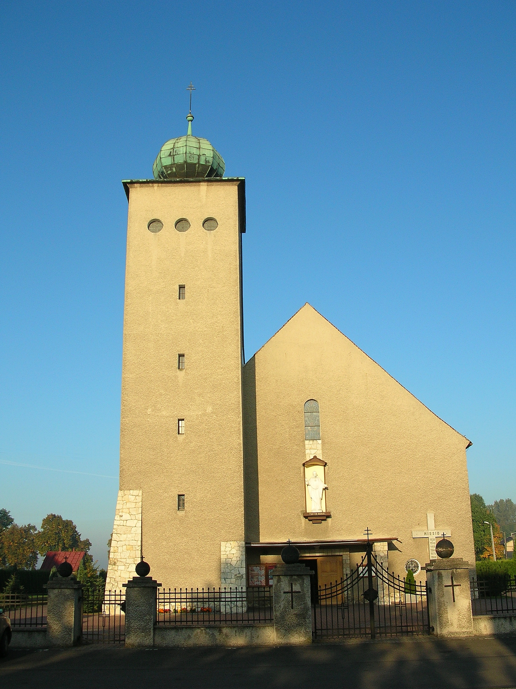 Kościół w Kadłubie.